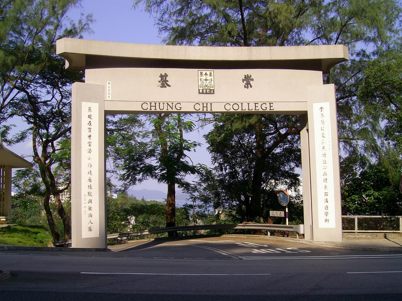 中文（香港）: 新崇基門崇高惟博愛本天地立心無間東西溝通學術；基礎在育才當海山勝境有懷胞與陶鑄人群。